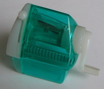 Taille-crayon mécanique - Objet personnel - Photo prise par moi même - LessayCatus 19:49, 3 December 2006 (UTC)